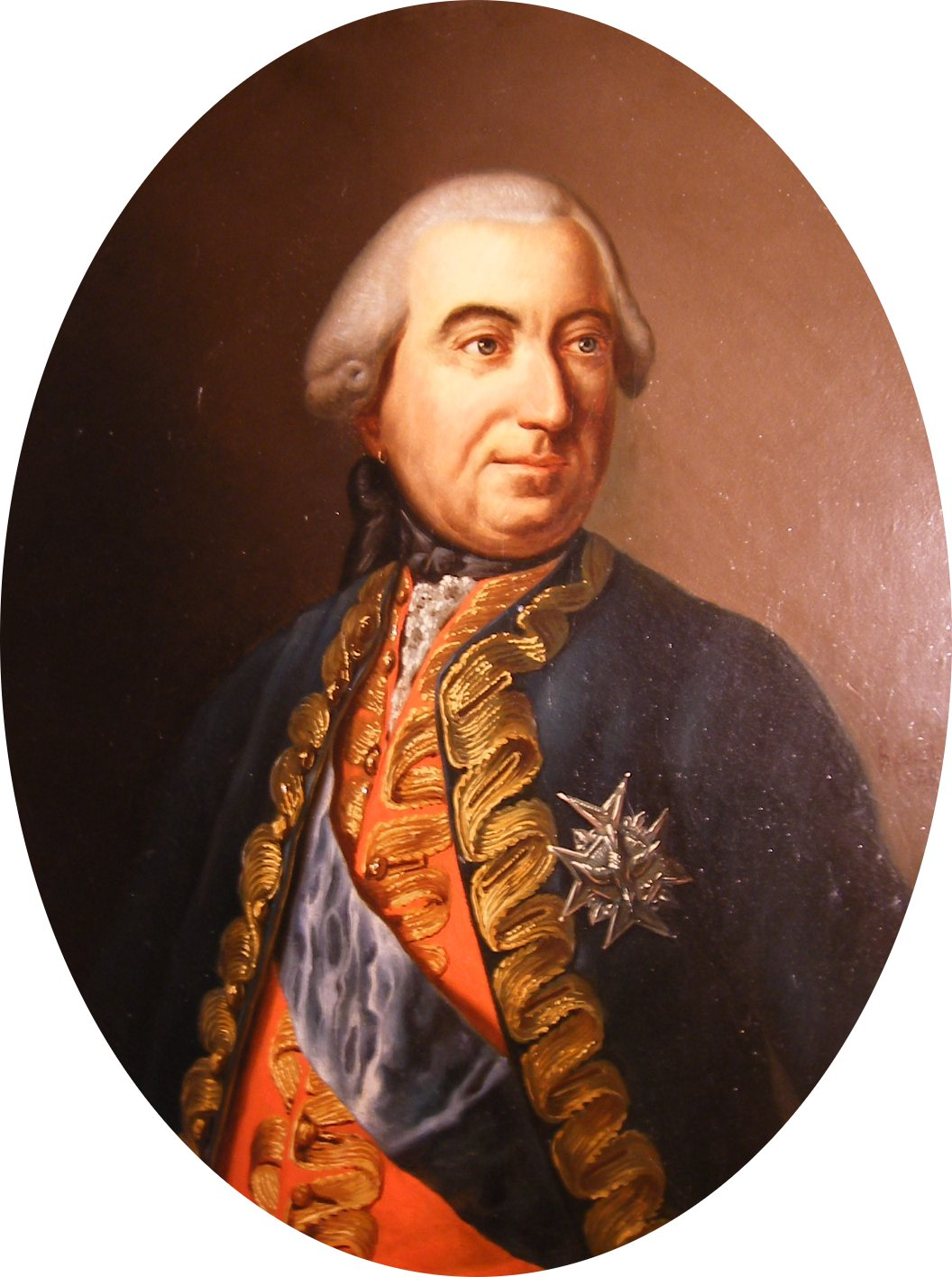 Le général Jean-Louis de Rochechouart